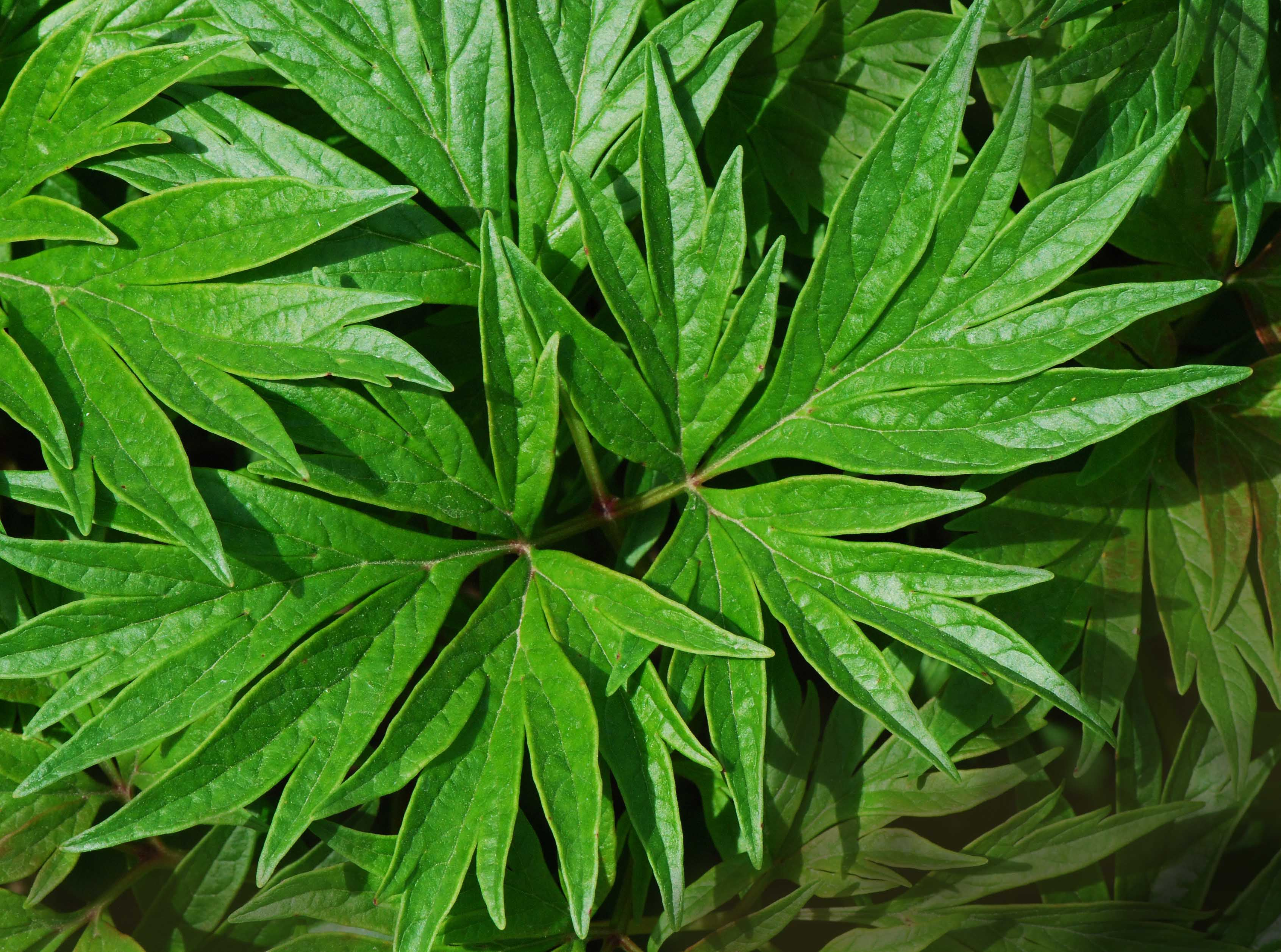 Paeonia anomala subsp. veitchii feuille, Jardin des Plantes de Paris.